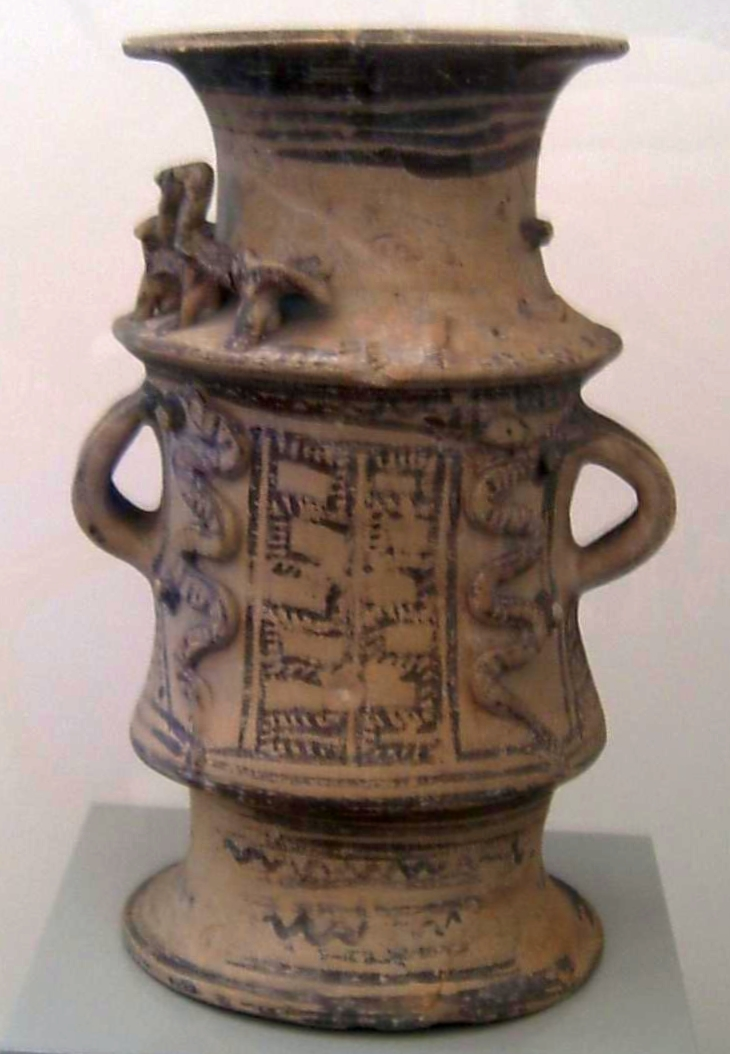 Zweihenklige Röhre (Eschara) für Trankspenden mit anmodellierten Schlangen und Vögeln, von Rhodos, um 720 v. Chr.